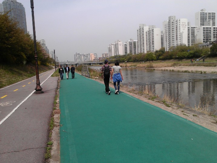 분당신도시에 흐르는 탄천 전경